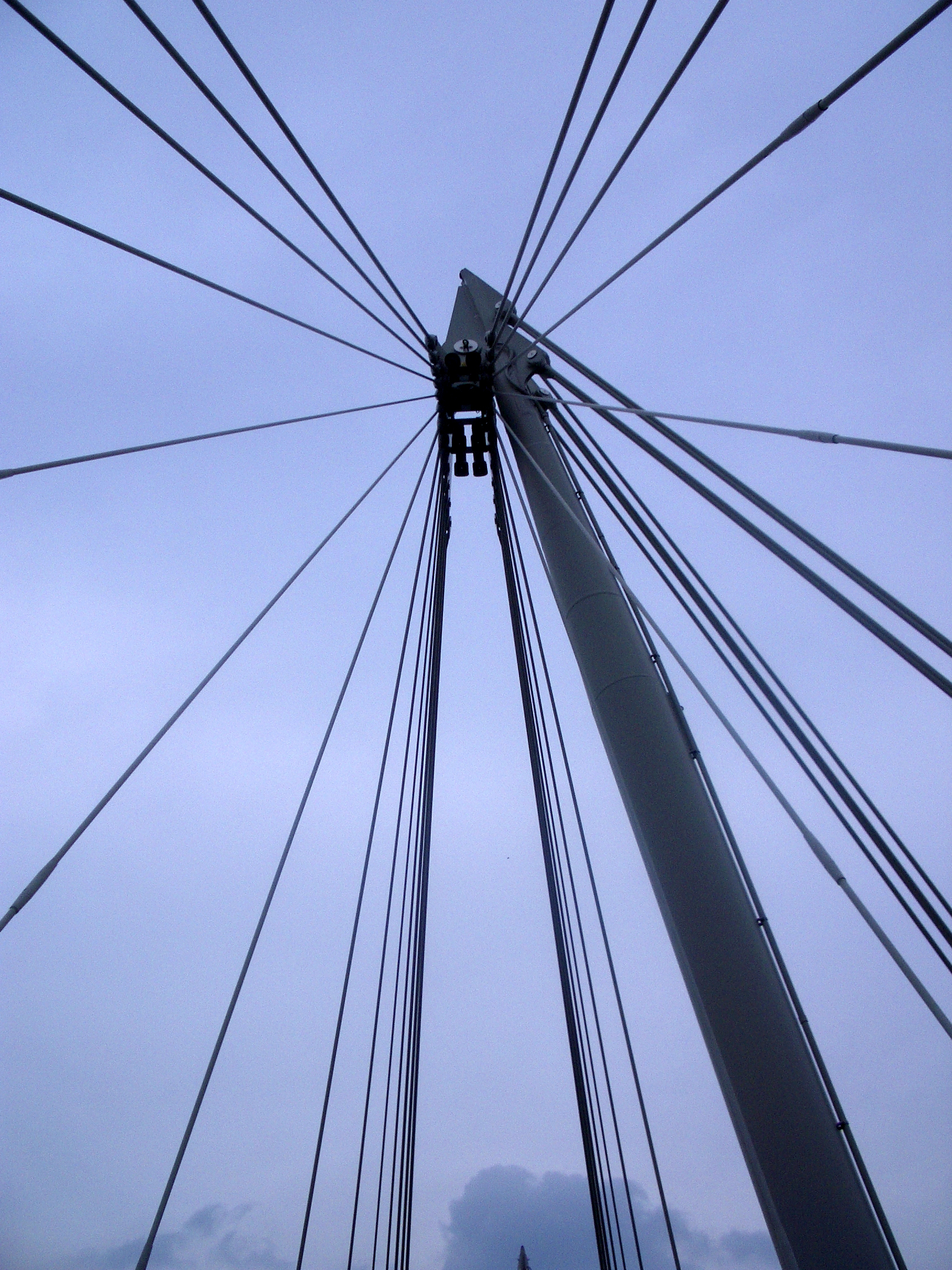 Závesná konštrukcia lávok Golden Jubilee Bridge.Hungerford Bridge